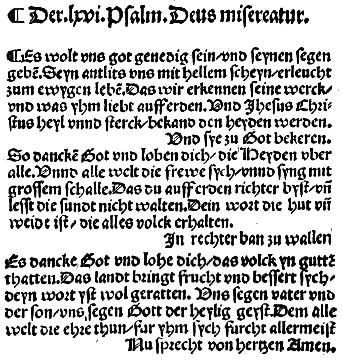 Es wolt vns got genedig sein im Enchiridion geistlicher Gesänge, Erfurt 1524